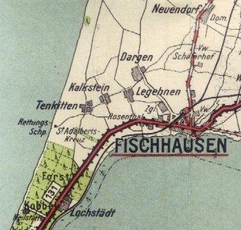 Ausschnitt aus einer Landkarte des Samlands